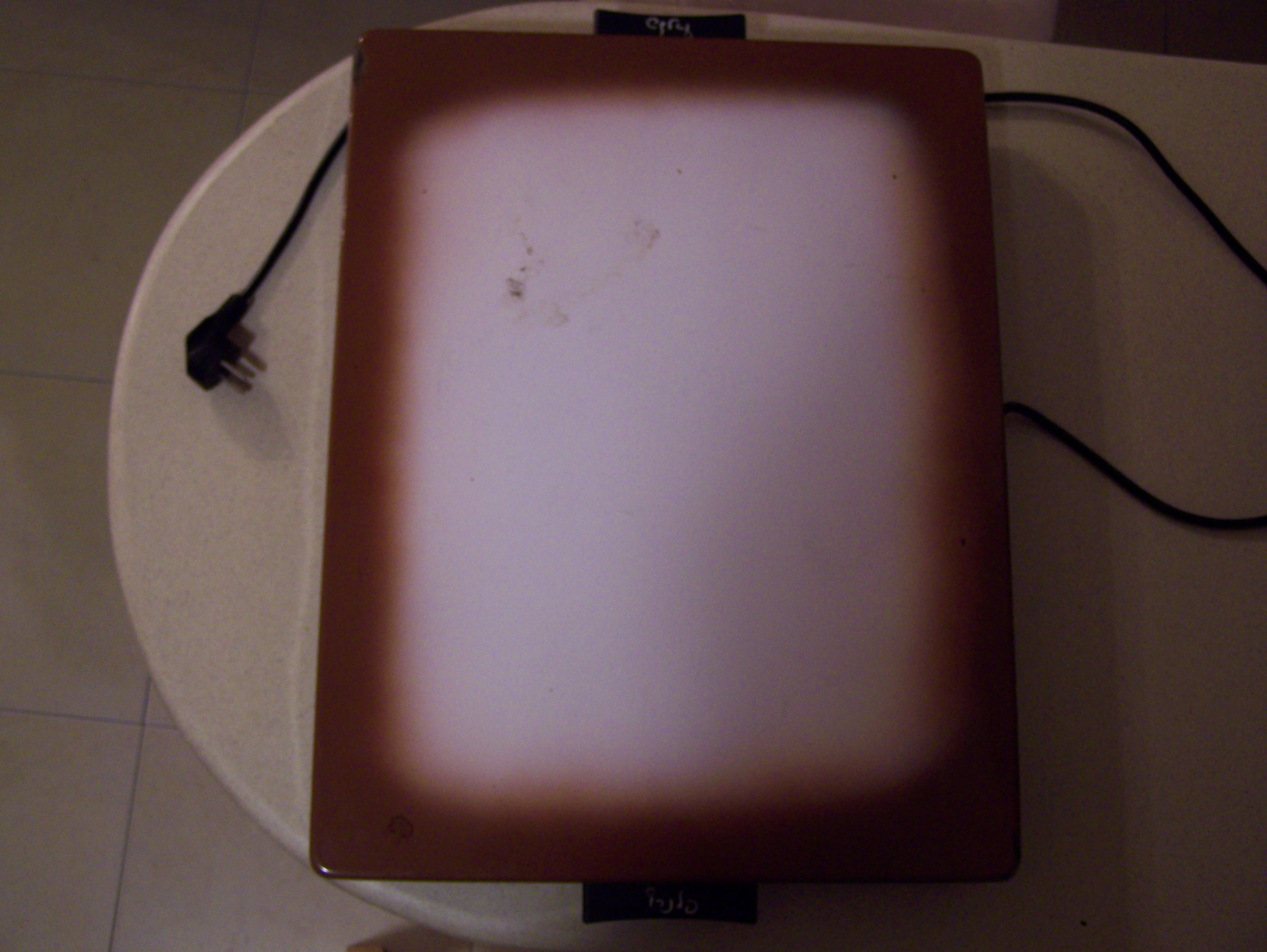 פלטת שבת